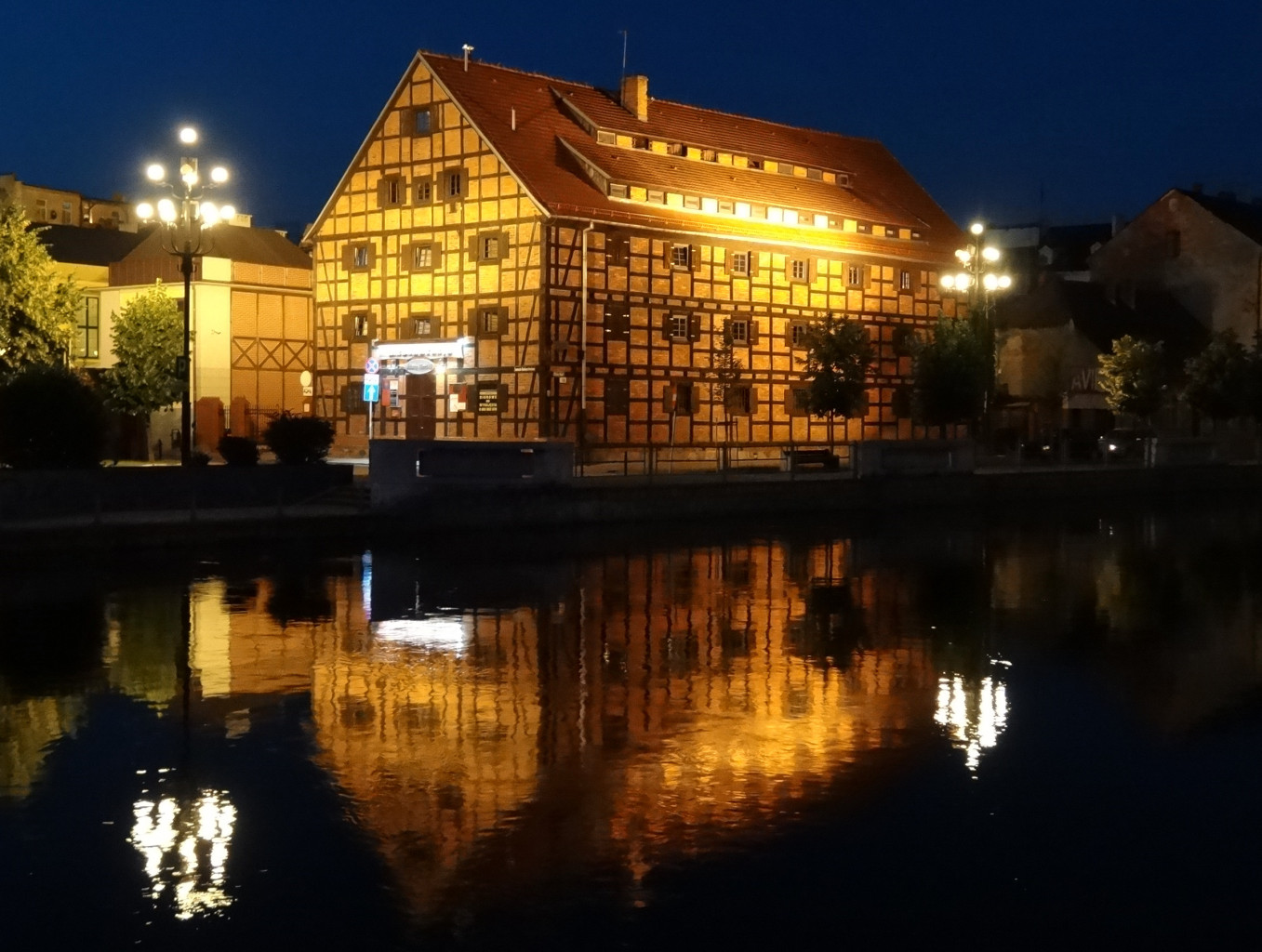 Spichlerz nad Brdą w Bydgoszczy przy ul. Stary Port zbud. w latach 30. XIX wieku